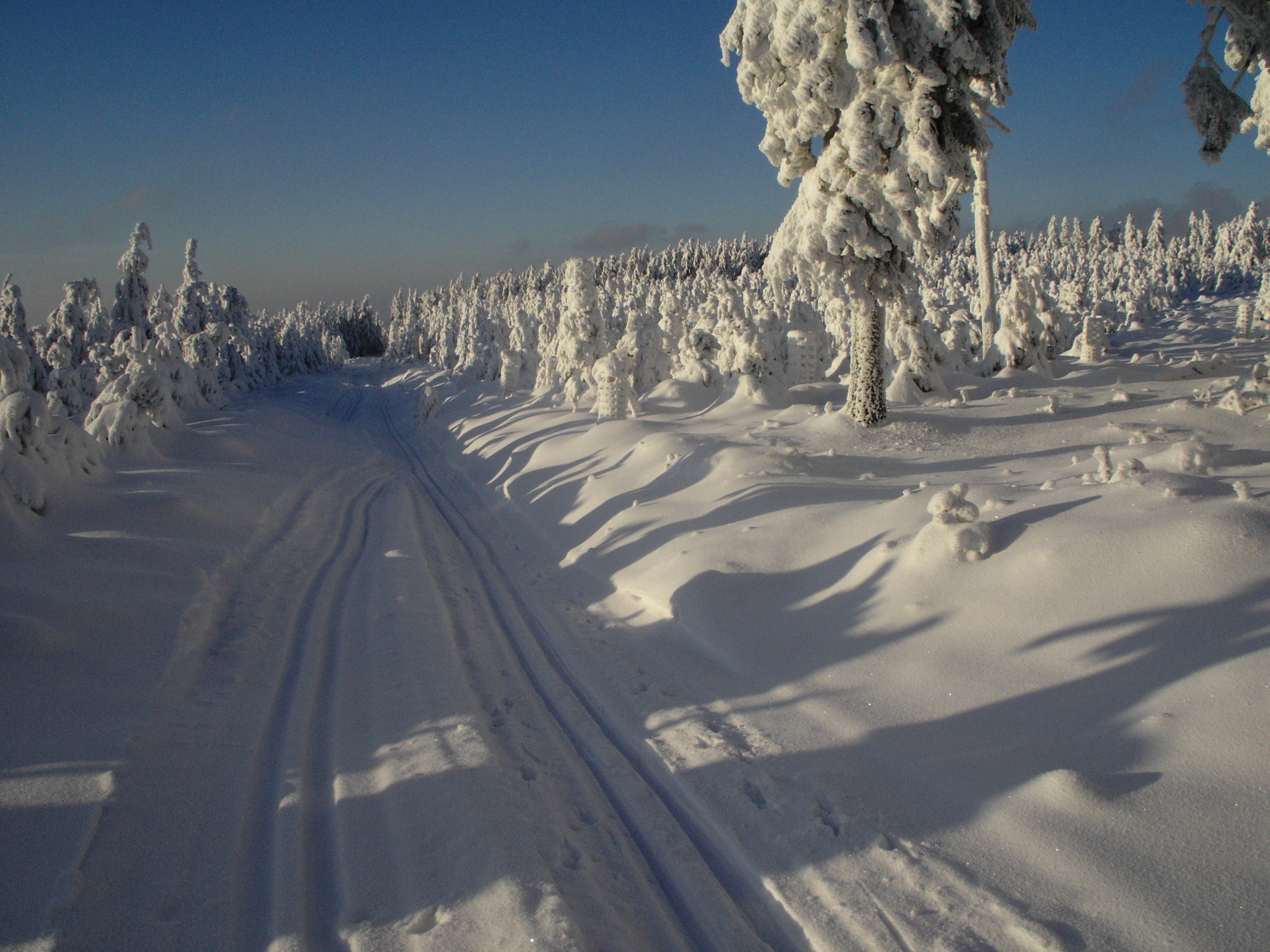 Salzkopf im Winter, Floh-Seligenthal, Thüringen, Deutschland